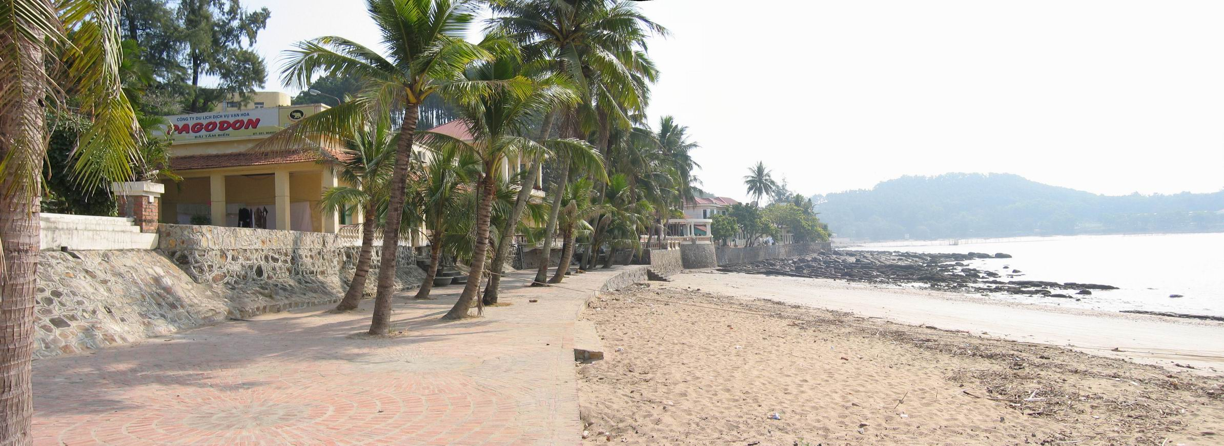 Plage du Pagodon au sud-ouest de la péninsule, fréquentée par les Français avant la guerre.